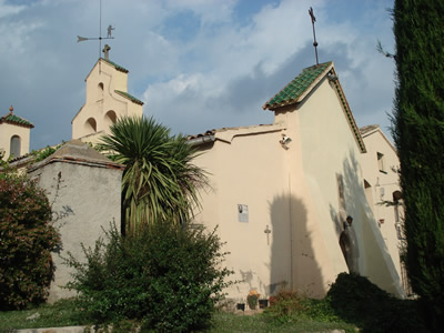 Església de Sant Romà - Santa Maria de Miralles